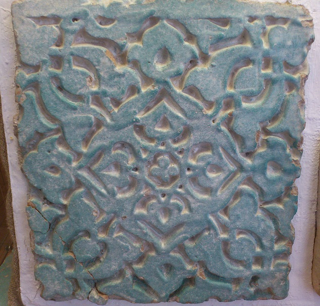 Облицовочная плита мавзолея XIV века из экспозиции Ессентукского историко-краеведческого музея